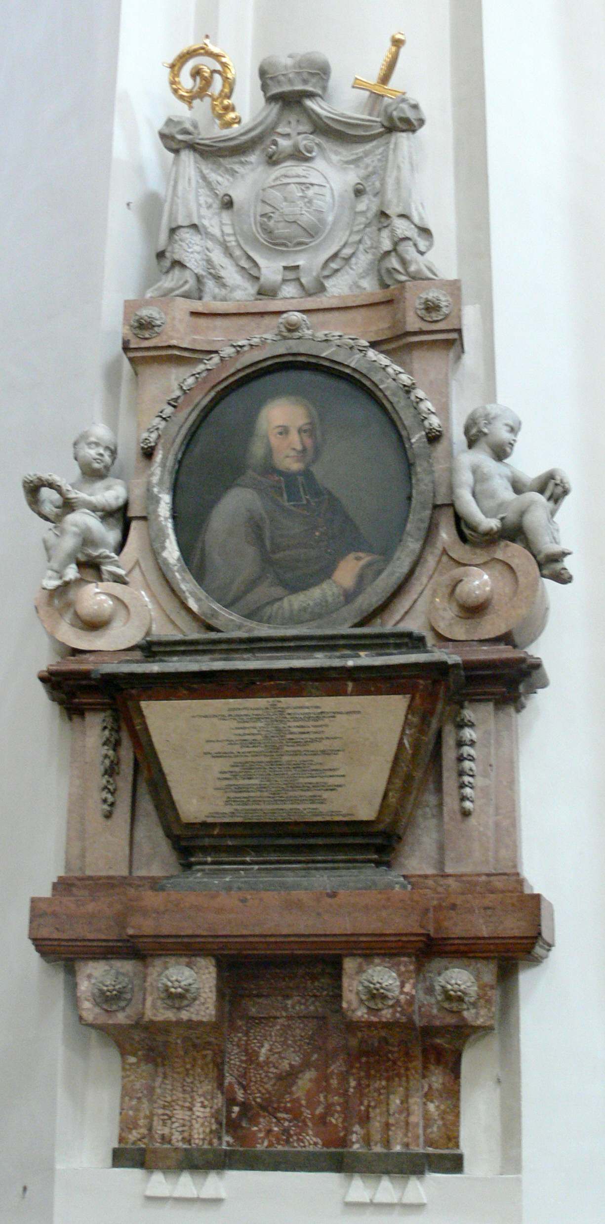 Passau, Dom St. Stephan Grabdenkmal des Bischofs Thomas Johann von Thun und Hohenstein